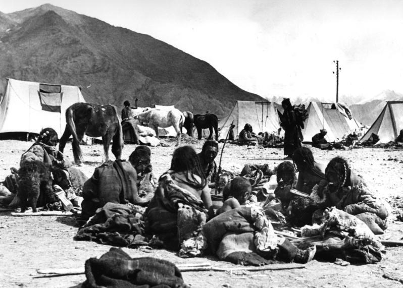 Lhasa, das Ngoloklager mit Landschaft